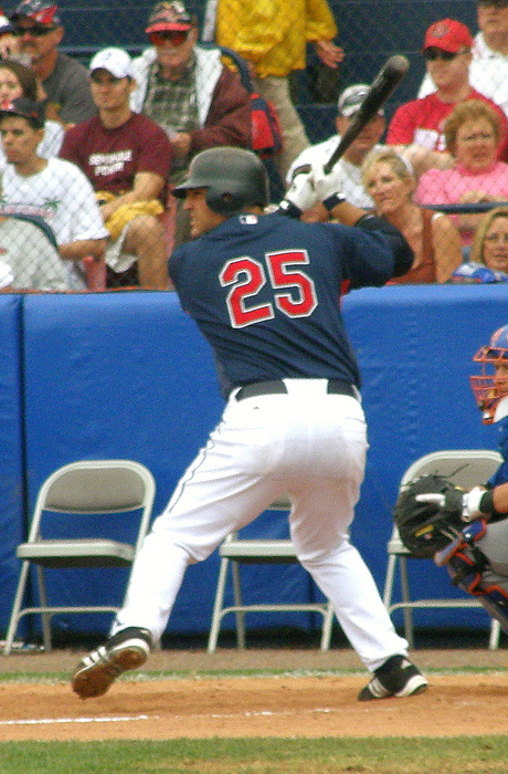 Ryan Garko